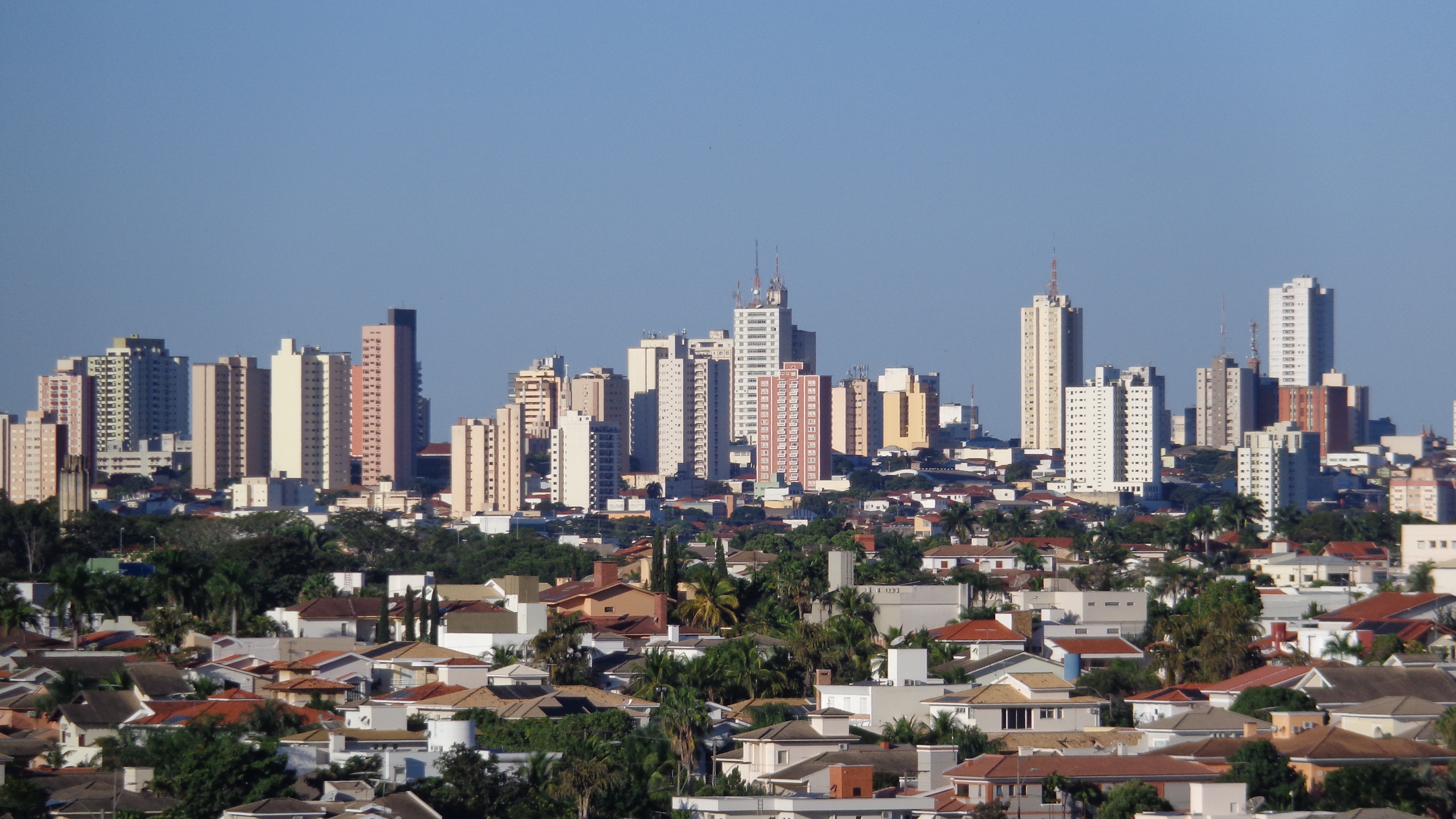 Skyline da cidade de Presidente Prudente